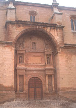 Puerta renacentista de la Iglesia de San Blas en Villarrobledo. Siglo XVI- XVII